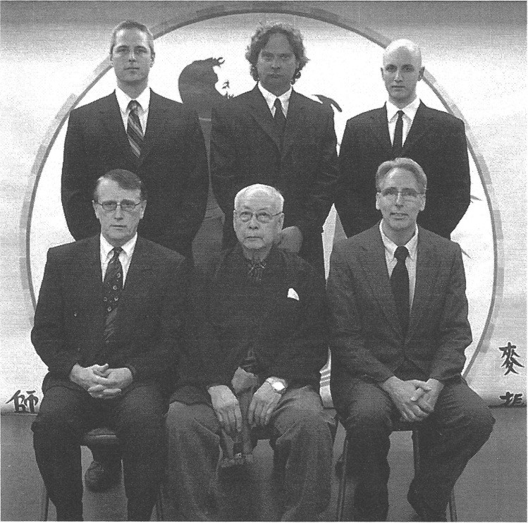 В соответствии с традицией, Мастер Джин Фун Марк выбрал пять своих приближённых учеников в качестве преемников стиля. Cлева направо, верхний ряд: Кейси Фрайер, Марк Алерт, Андре Балиан; нижний ряд: Грег (Крис) Кристенсен, Мастер Джин Фун Марк, Брайан Бэйли St.Paul, Minnesota 2011